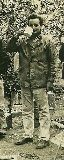 El paleontólogo argentino José Fernando Bonaparte, en Los Colorados, Argentina, 1964.